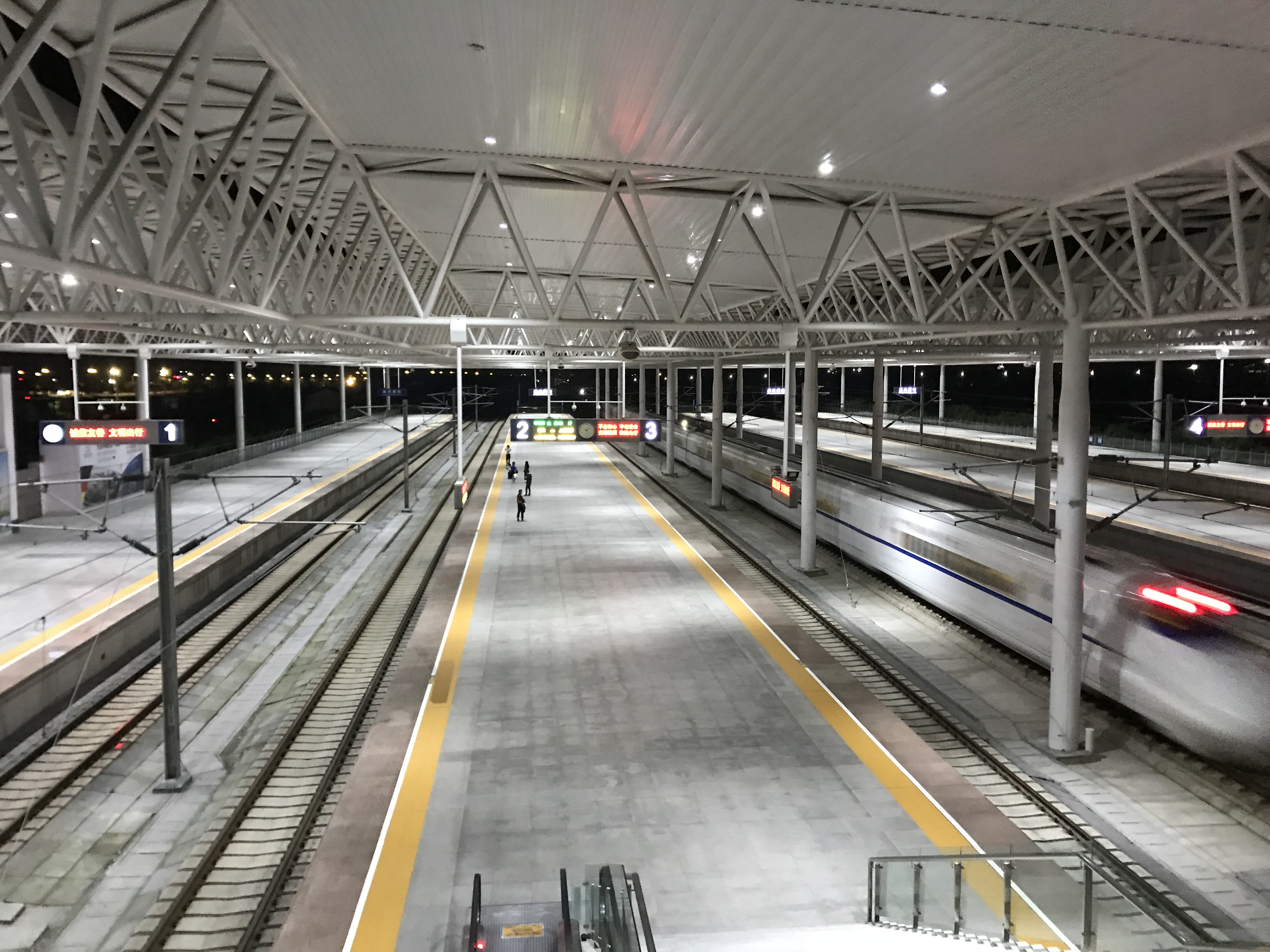 嘉興南駅のホーム